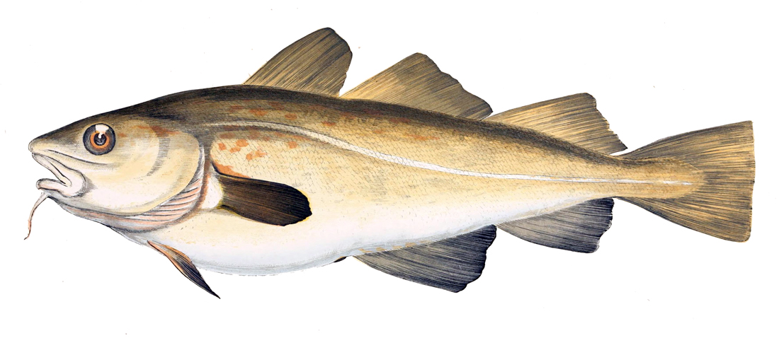 Gadus morhua